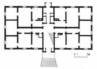 БДСГА. Жылы дом. План першага паверха.